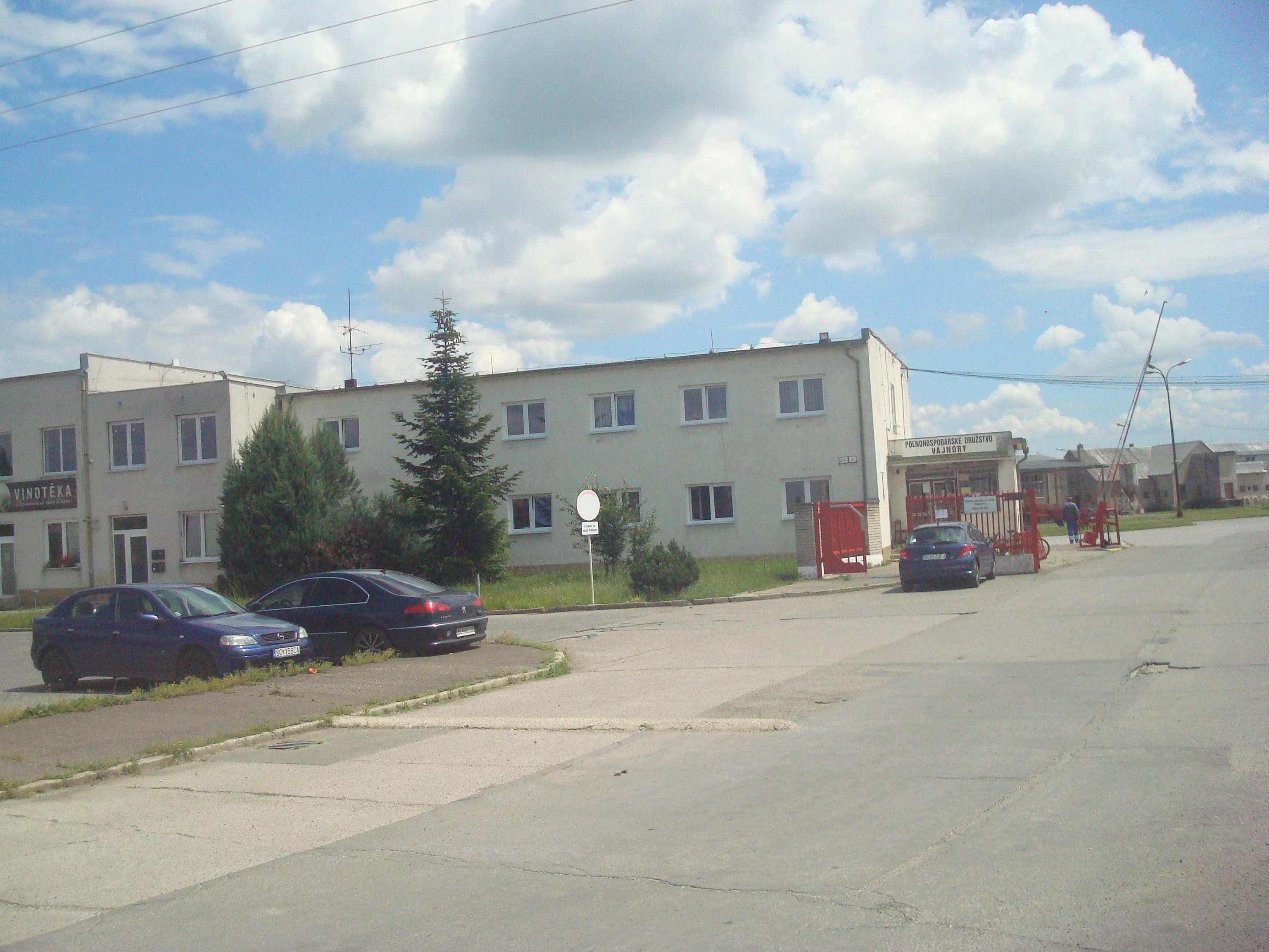 Agriculture house, Hospodárska street, Vajnory, Bratislava, Slovakia